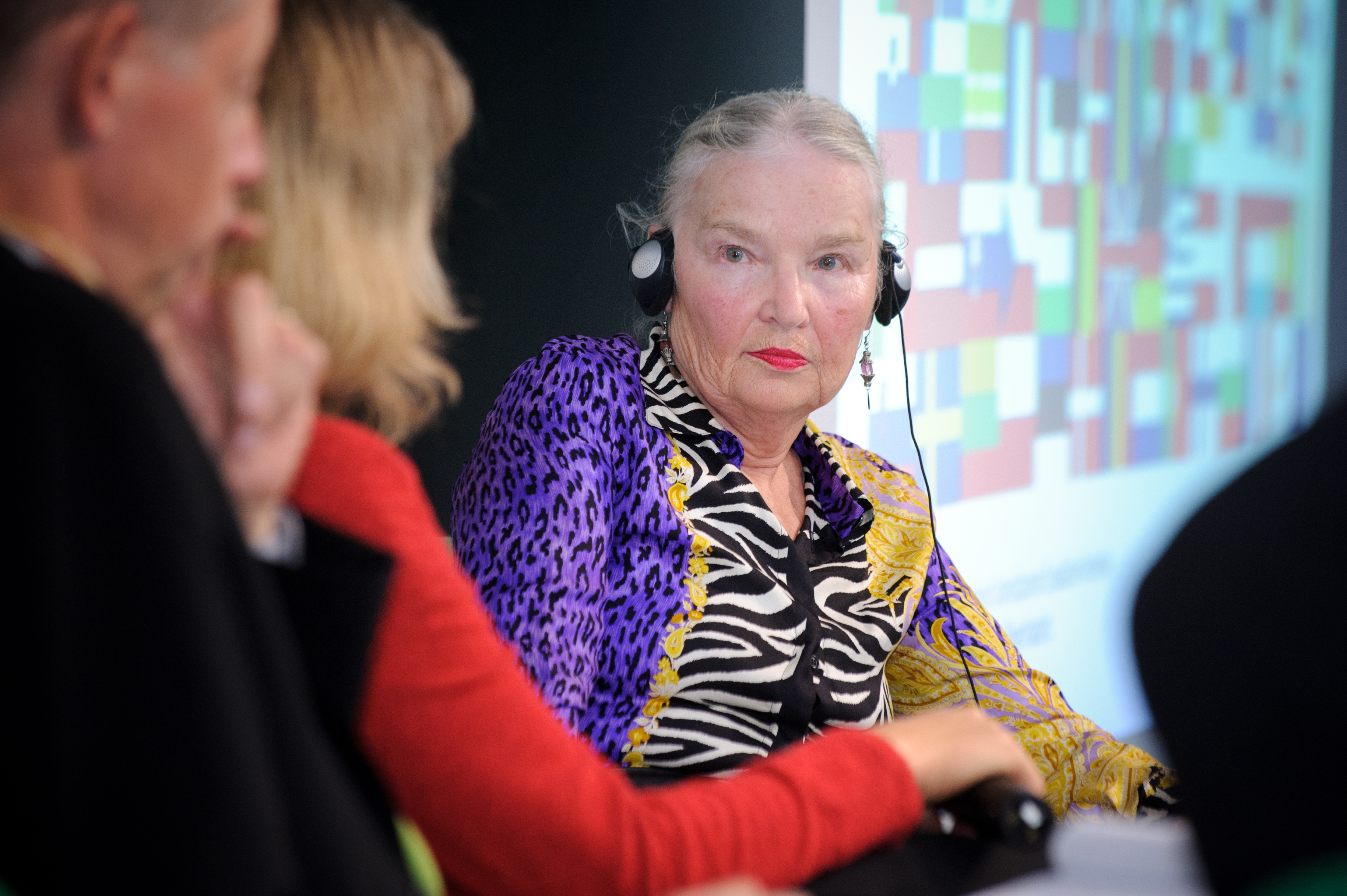 Prof. Jadwiga Staniszkis (em., Universität Warschau) Konferenz: Solidarität und Stärke - Zur Zukunft der Europäischen Union